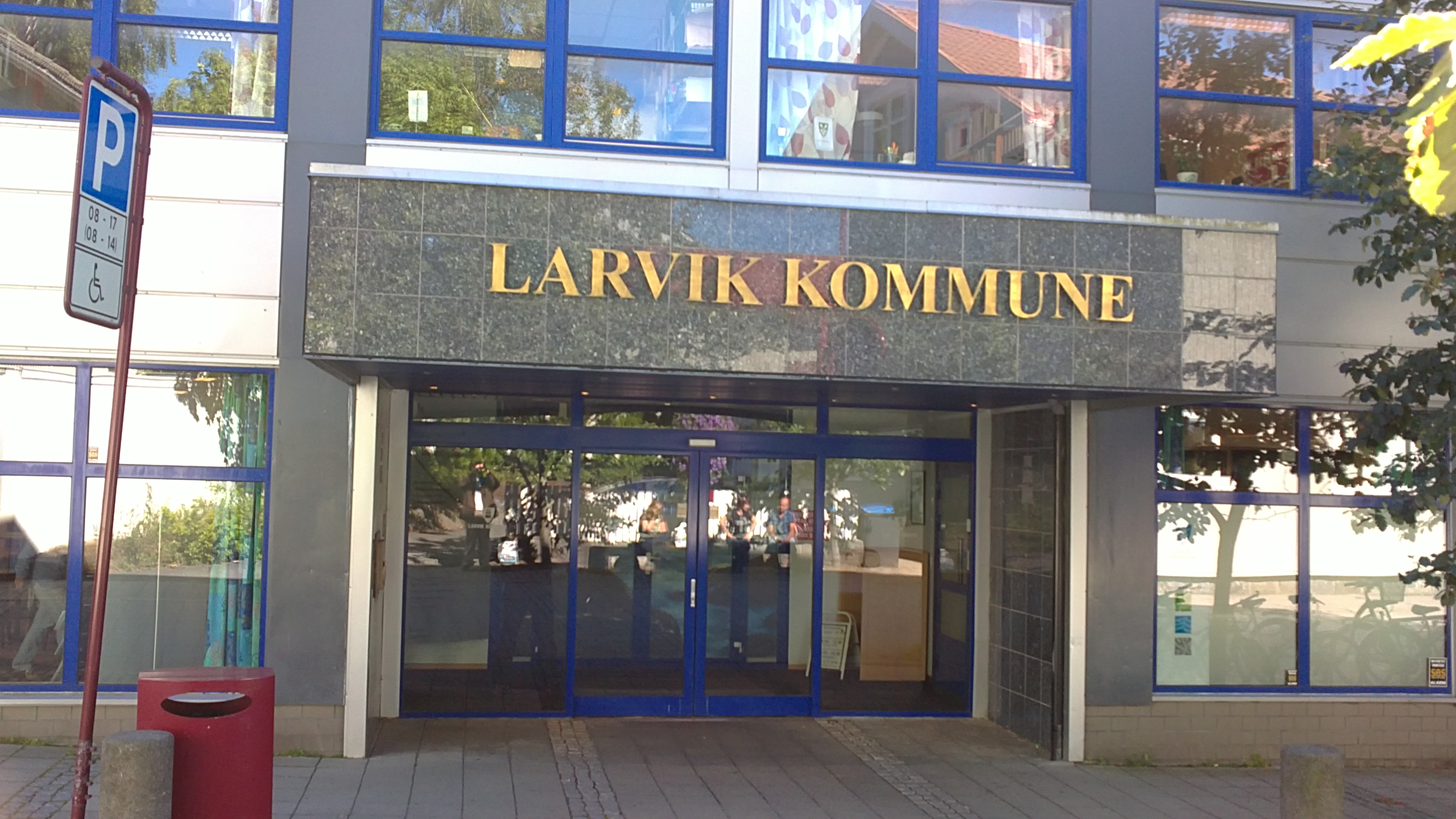 Bilde av inngangsdøren til Larvik kommunes kontorer i Feyers gate 7, hvor også The Heyerdahl Institute holder til